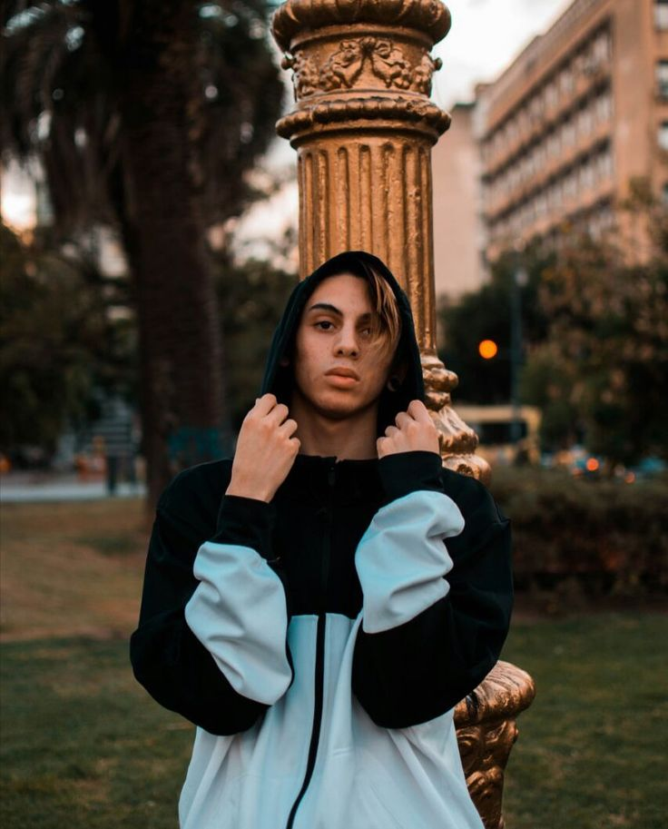 KHEA es un cantante y compositor argentino del género urbano en español